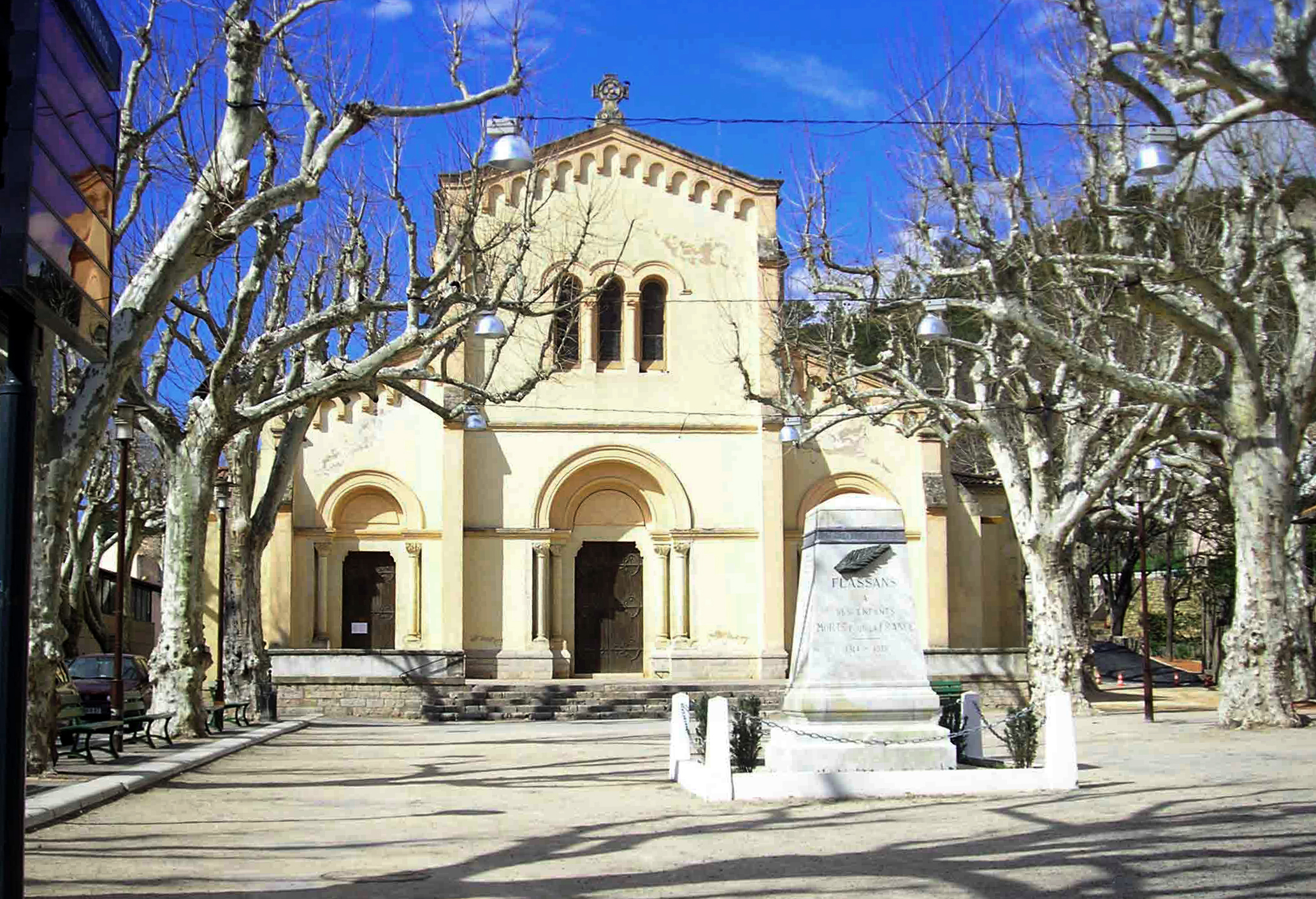 jean paul barbero